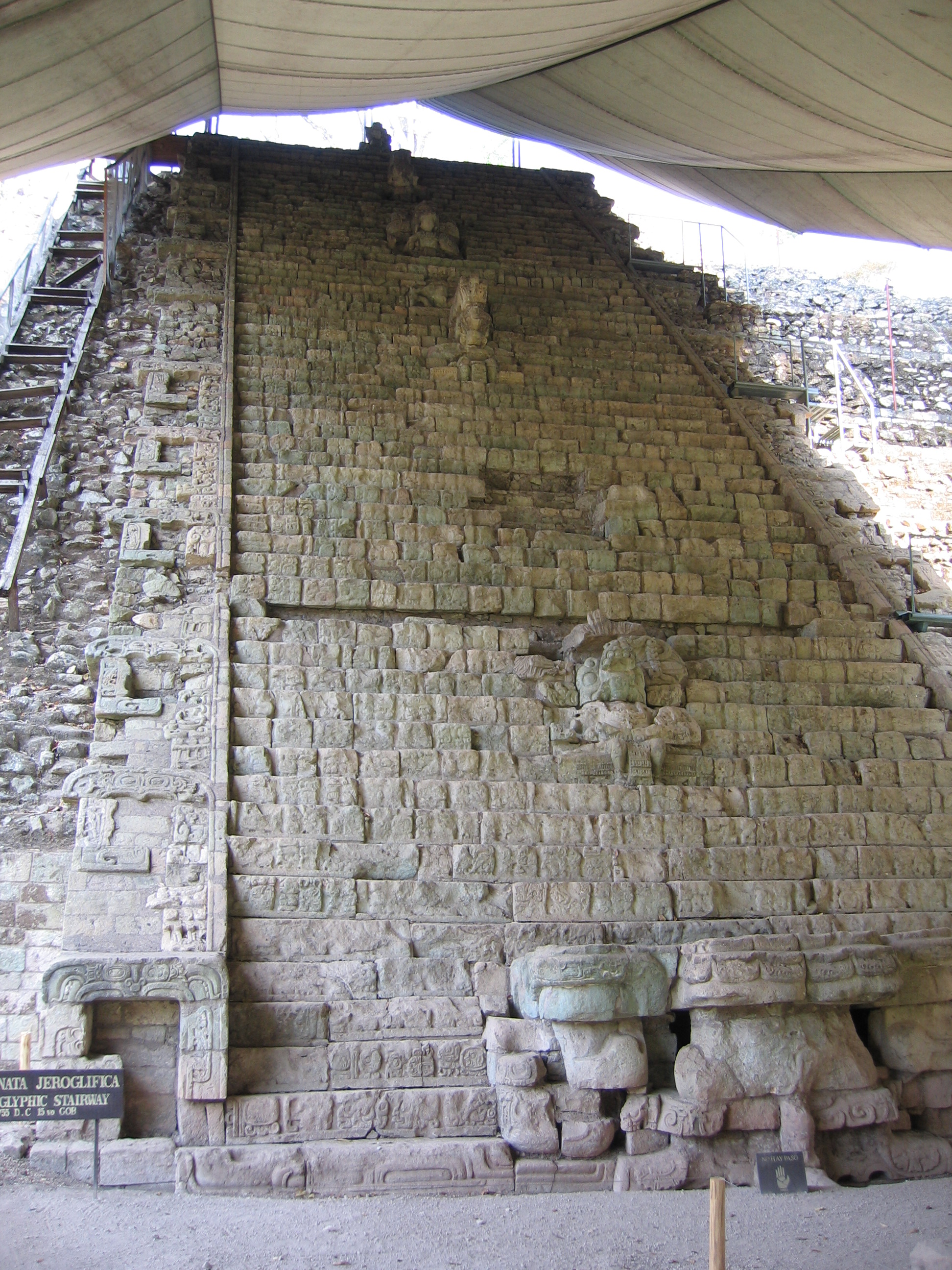 Escalinata de los jeroglíficos en Copán (Honduras).